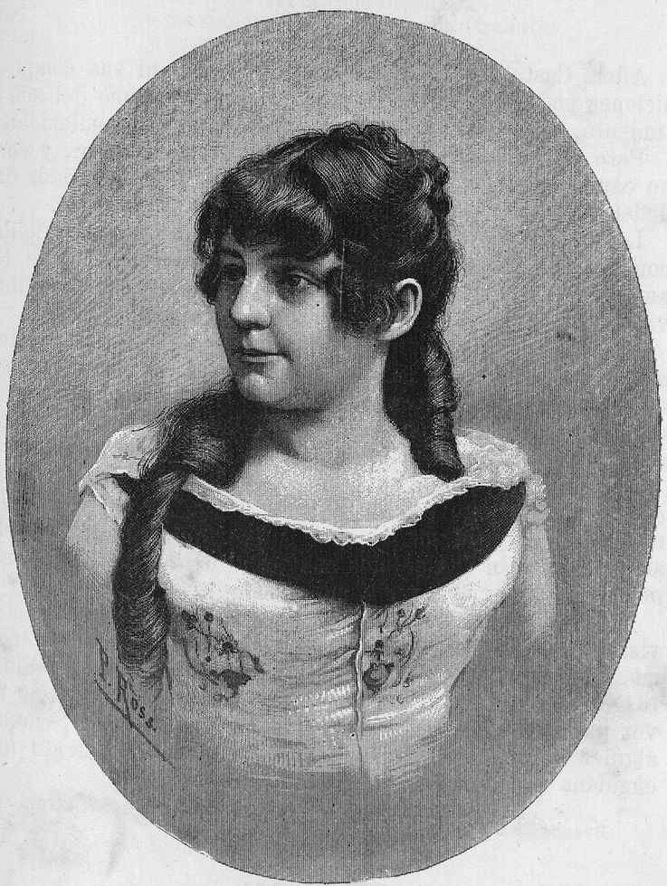 Adela Castell.